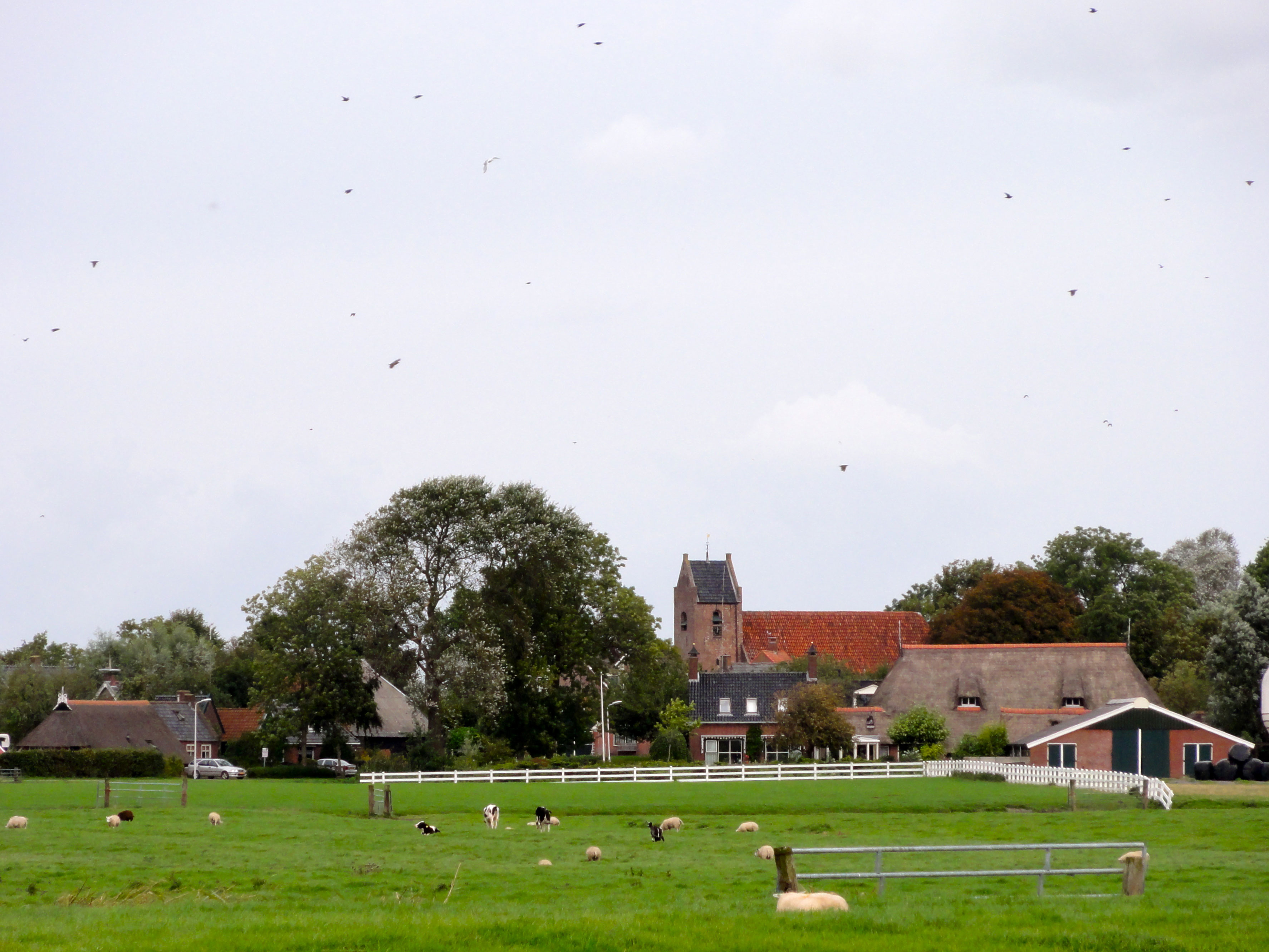 Hervormde kerk met toren van Oostrum